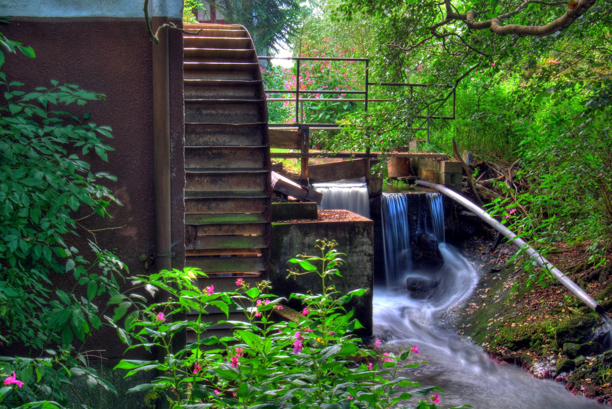 Dernmühle an der Wiera (Schwalm) bei Wiera. Findet sich 1 km nordöstlich von Wiera. Mühlengehöft auf dem rechten Ufer der Wiera.